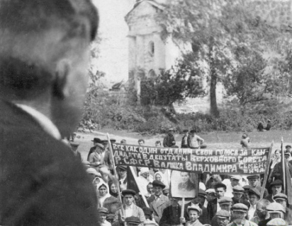 Выдвижение Валик В. С. депутатом Верховного Совета РСФСР I созыва по Комаричскому избирательному округу, 1938 г.